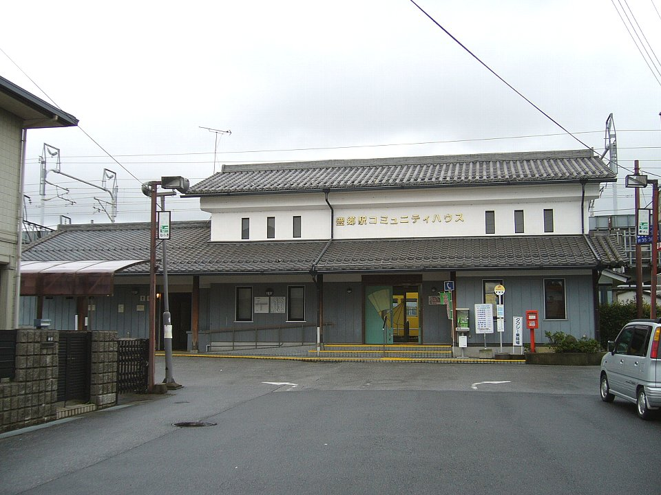 近江鉄道豊郷駅